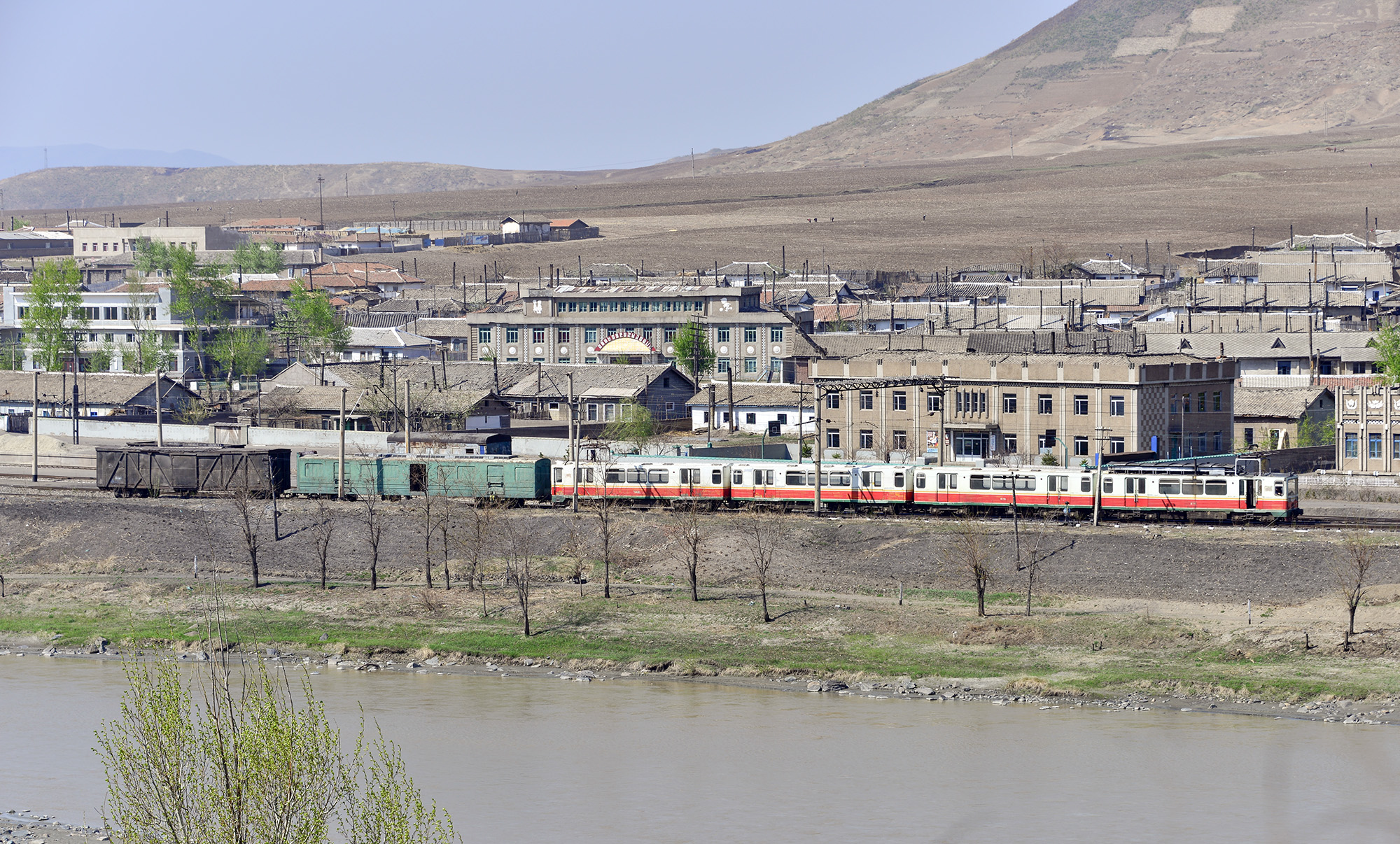 柏林地铁淘汰的列车停靠在稳城郡三峰站